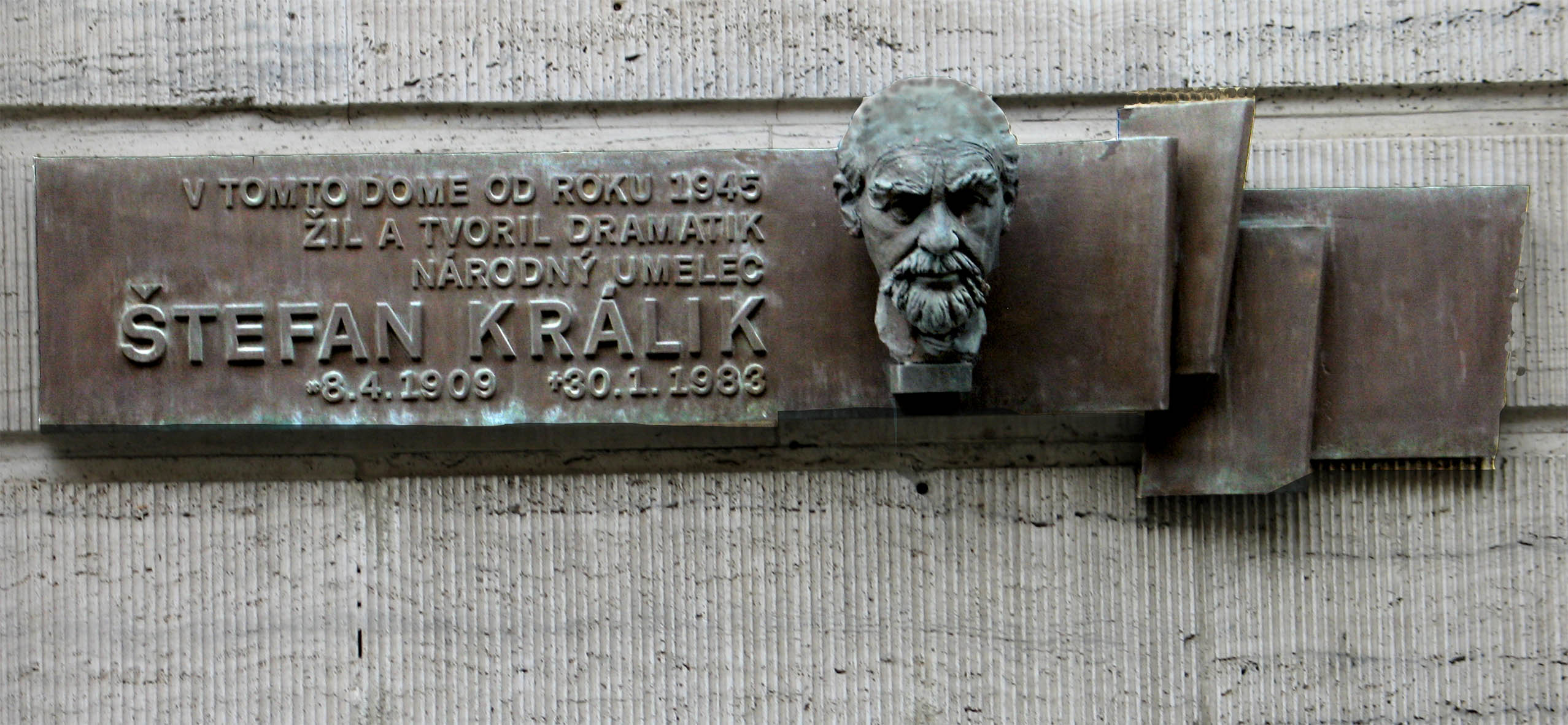 Tabuľa v Strakovej ulici, na dome ktorý obýval Štefan Králik